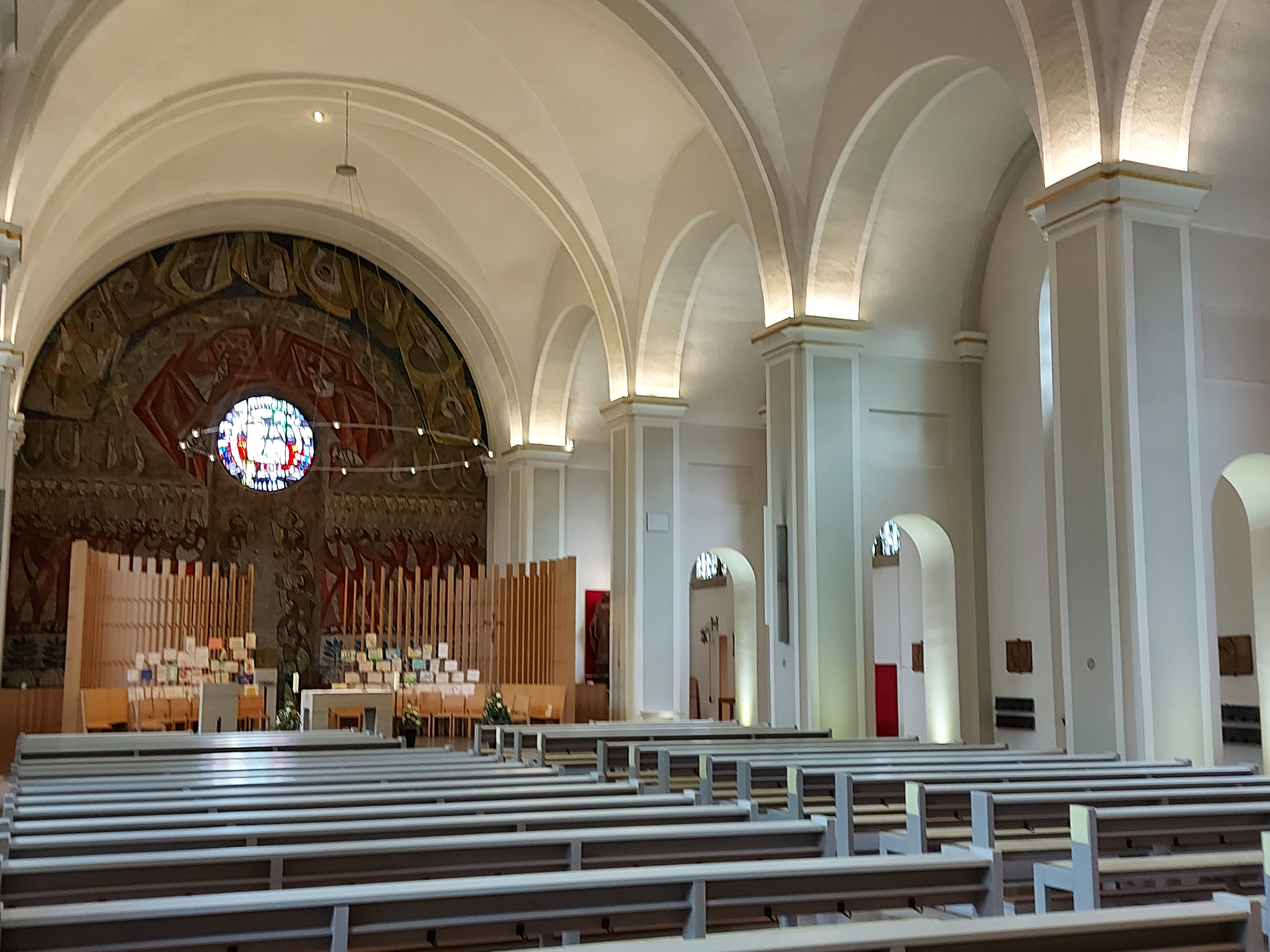 Inneres der St. Sixtus-Kirche in Werlte (Niedersachsen).